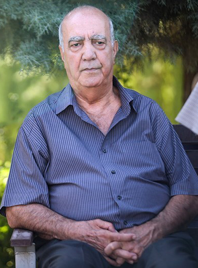 پرویز ربیعی ۲۲ شهريور ۱۳۹۷